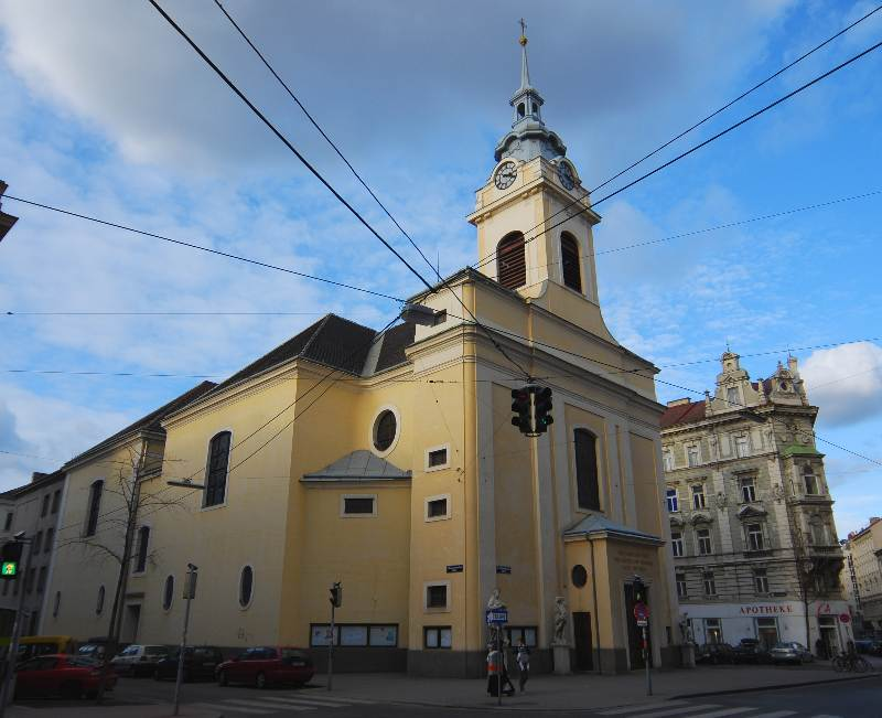 Pfarrkirche Sankt Josef (Joseph) in der Schönbrunner Straße 50 in Wien-Margareten